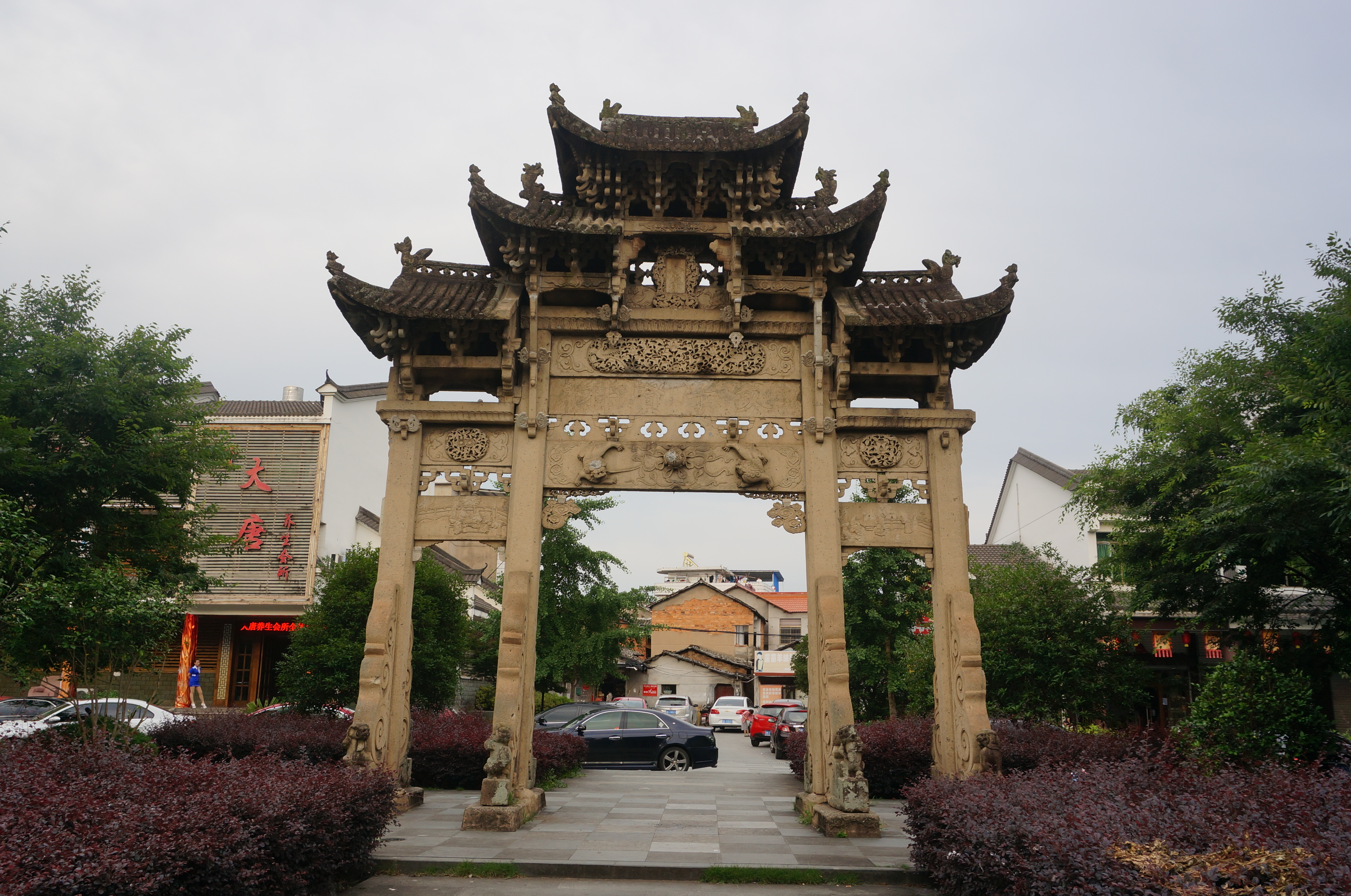 詹宝兄弟进士牌坊，西面。